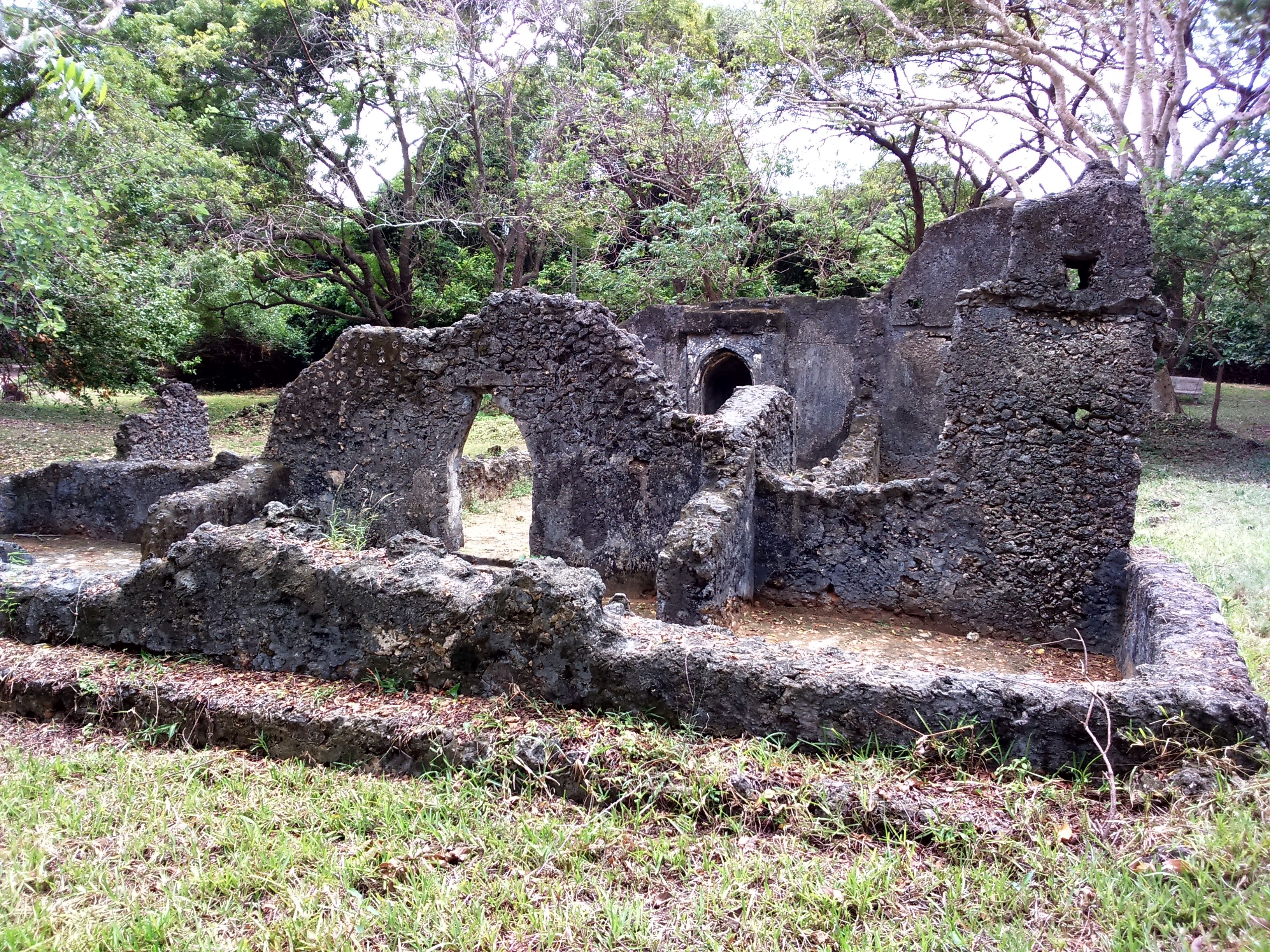 Mosquée